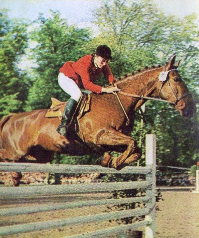 Janou Lefèbvre (1972), 'Munchen 72', Panini figurina n°141.